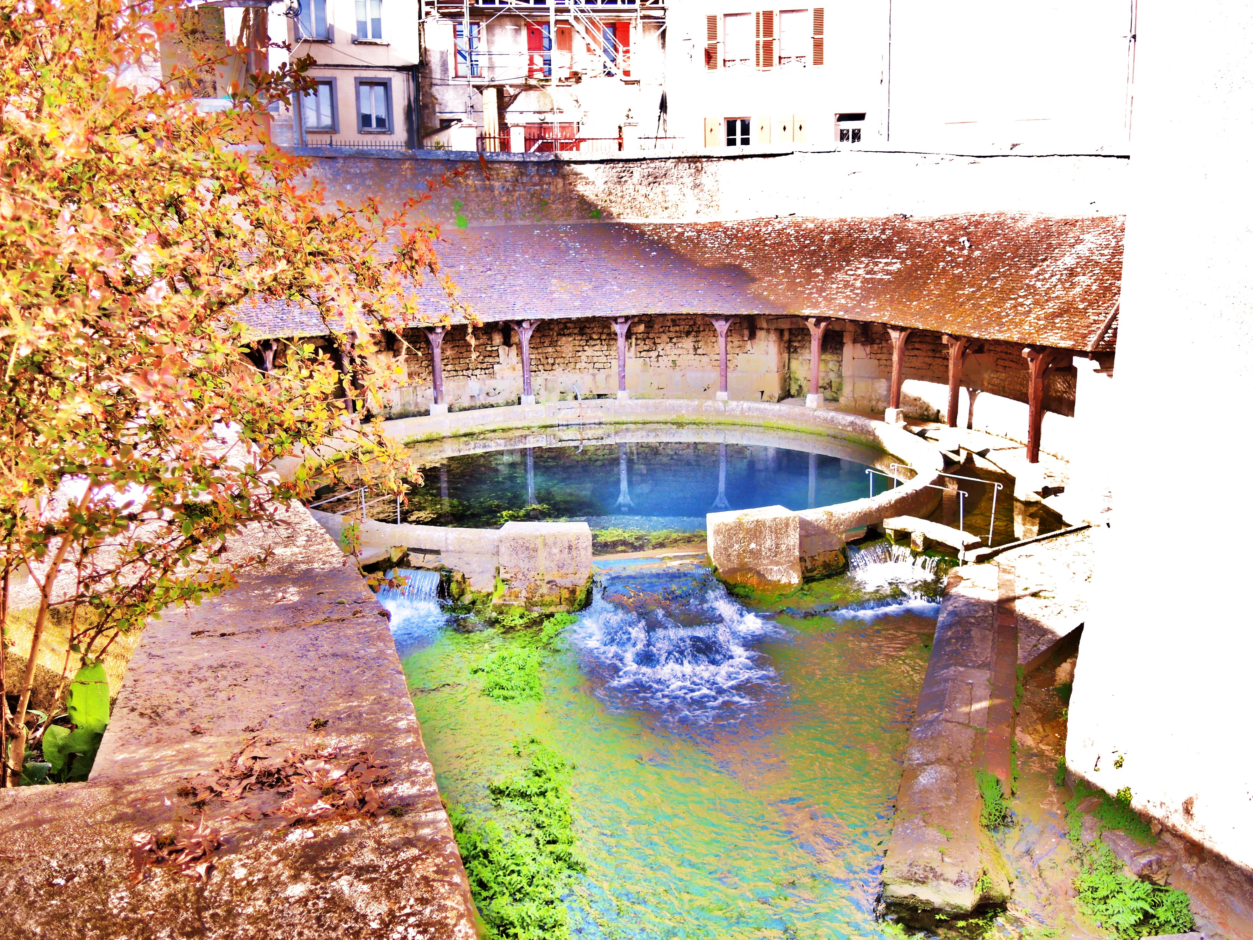 Tonnerre. Source résurgente nommée fosse Dionne.